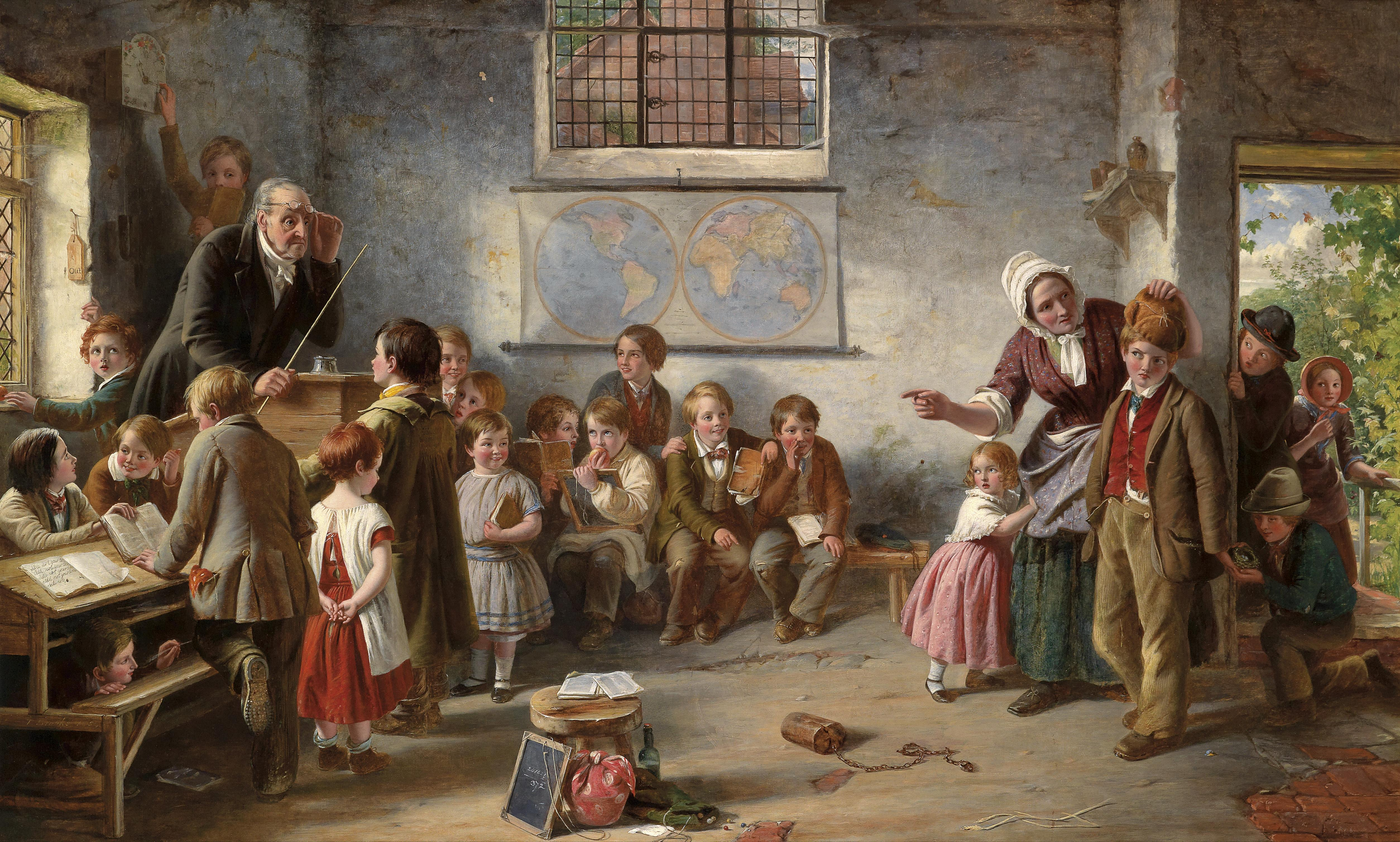 Der neue Schüler, signiert, datiert T. Brooks 1854, Öl auf Leinwand, 71 x 116 cm